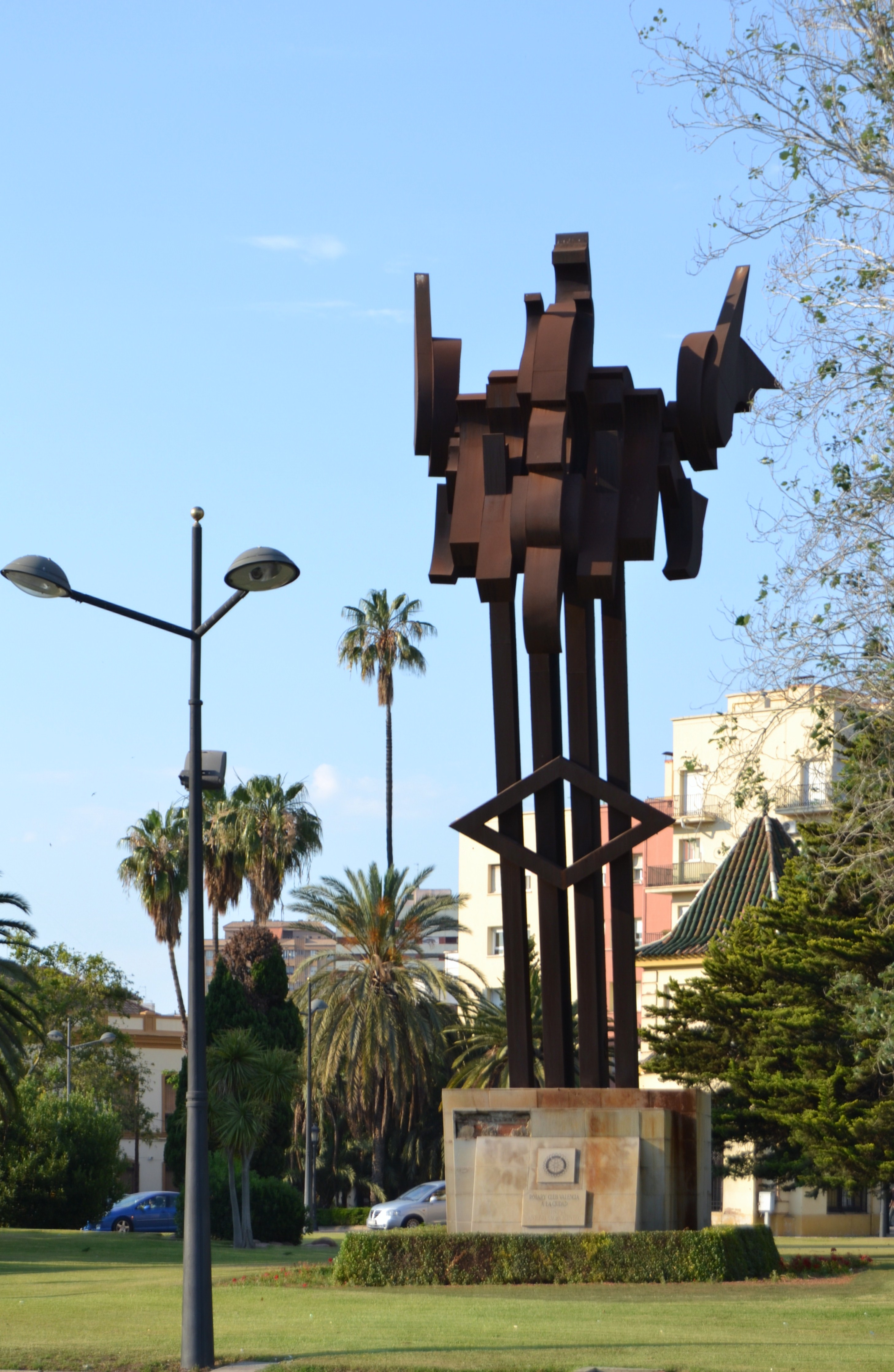 Plaça de Saragossa de València, cap del rei Jaume I.